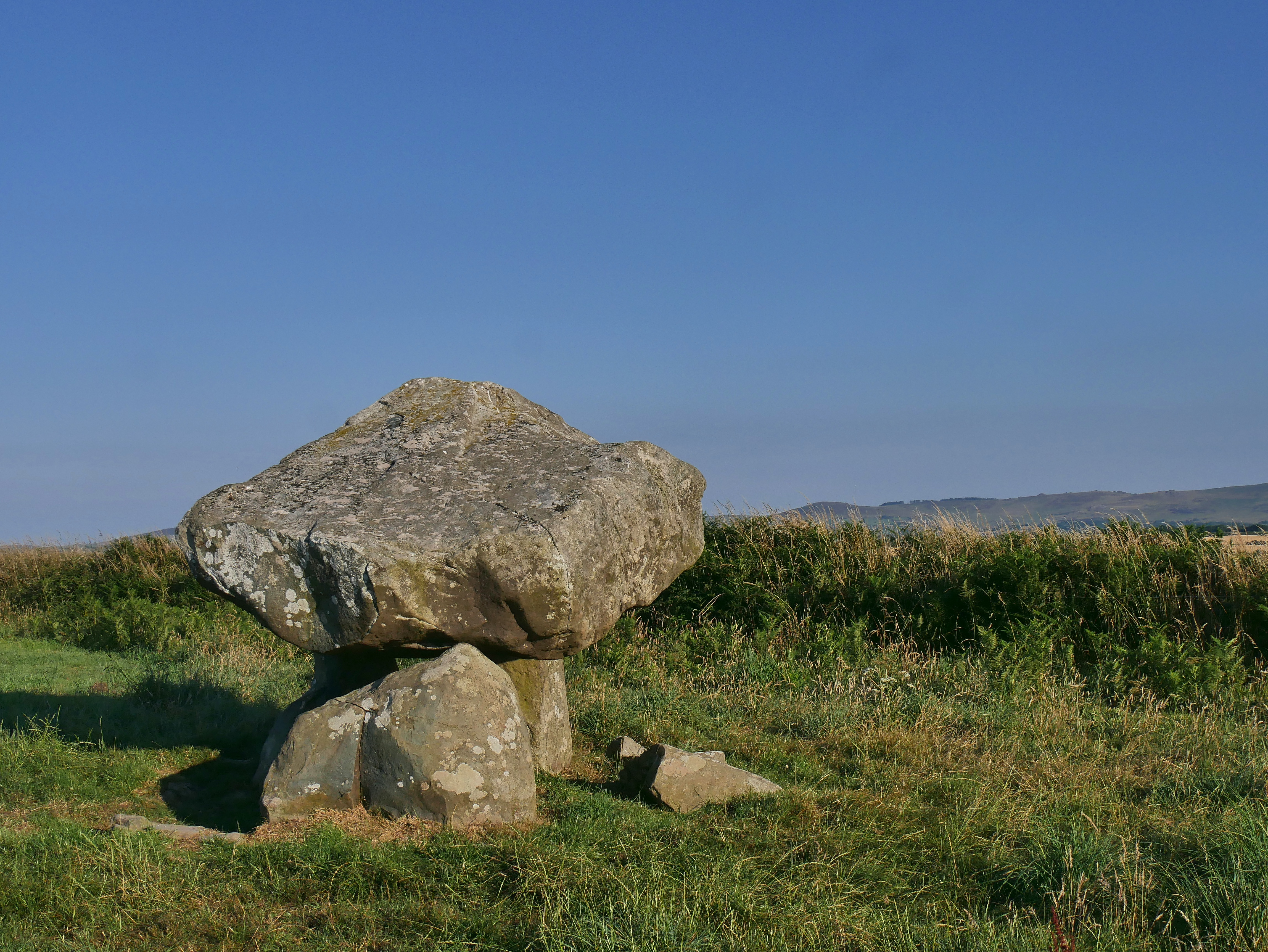 The Neolithic burial chamber Llech-y-Dribbed, or Llech-y-Trypedd, ¾ of a mile from the village of Moylgrove, in Pembrokeshire (Wales).